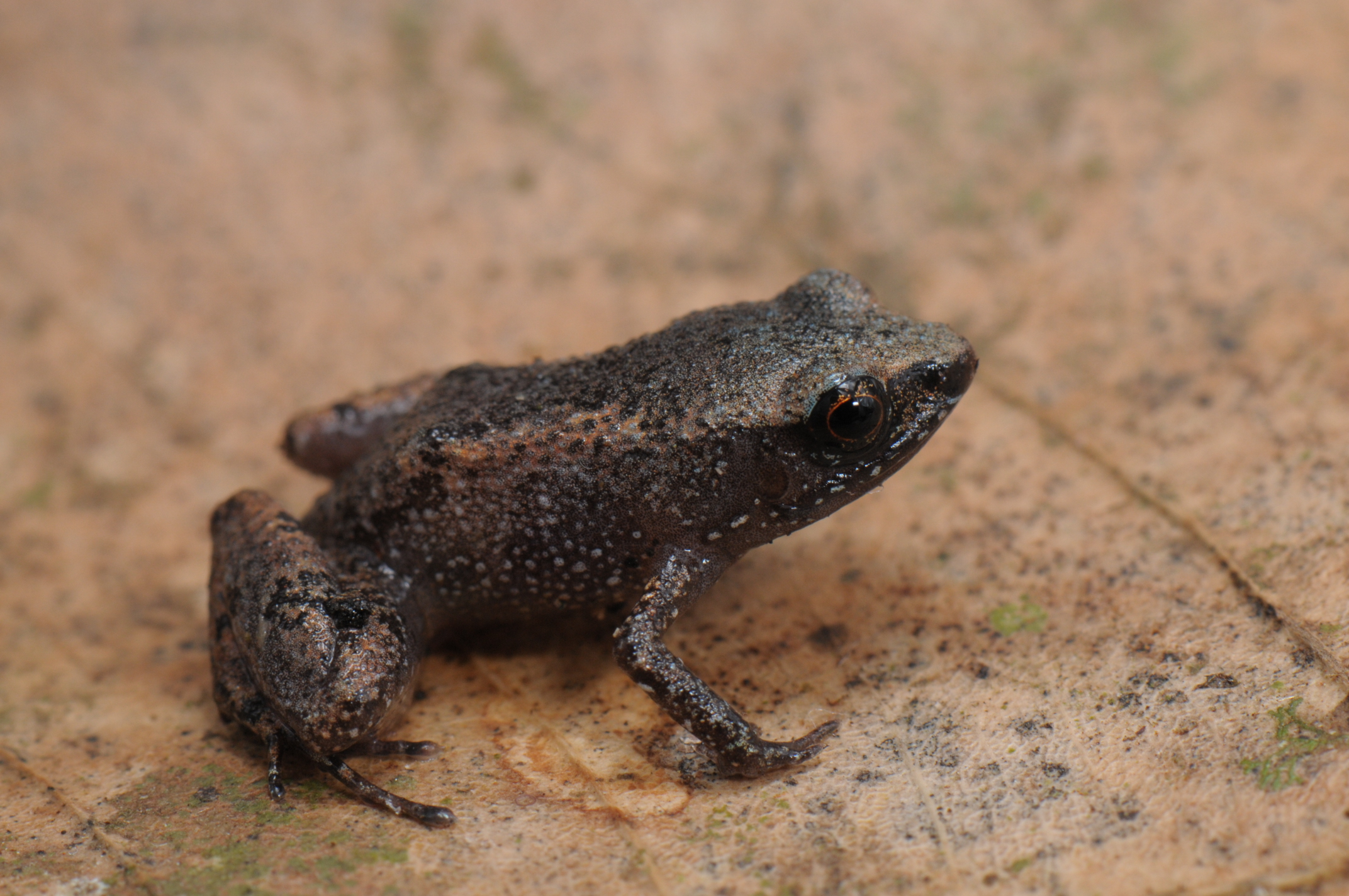 Sapo-de-folhiço - Adelophryne mucronatus - Espécie endêmica da Mata Atlântica, a imagem foi registrada na Bahia.